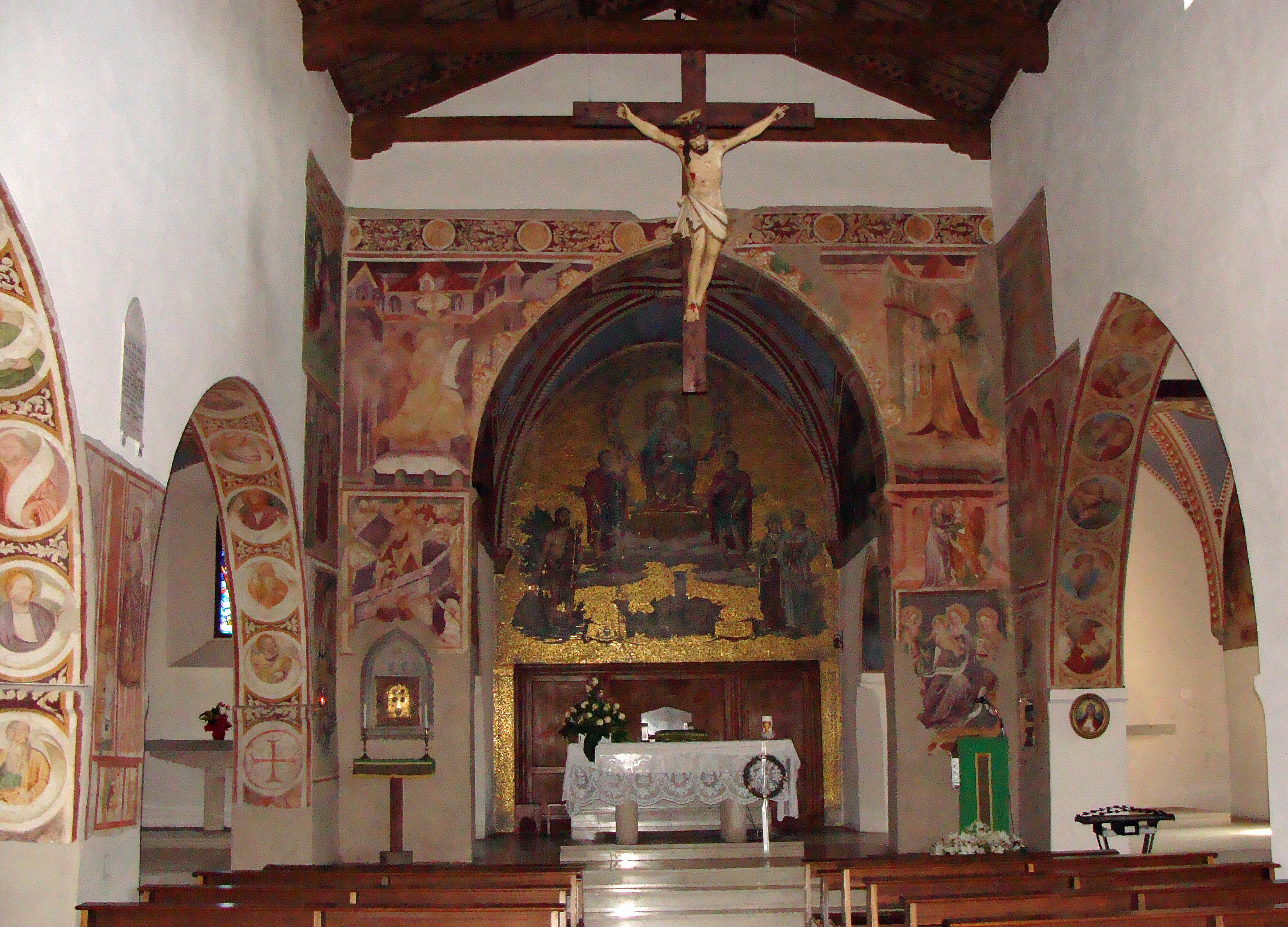 intérieur de l'église de San Gervasio à Nimis (région Friuli - Venezia Giulia) Italie.